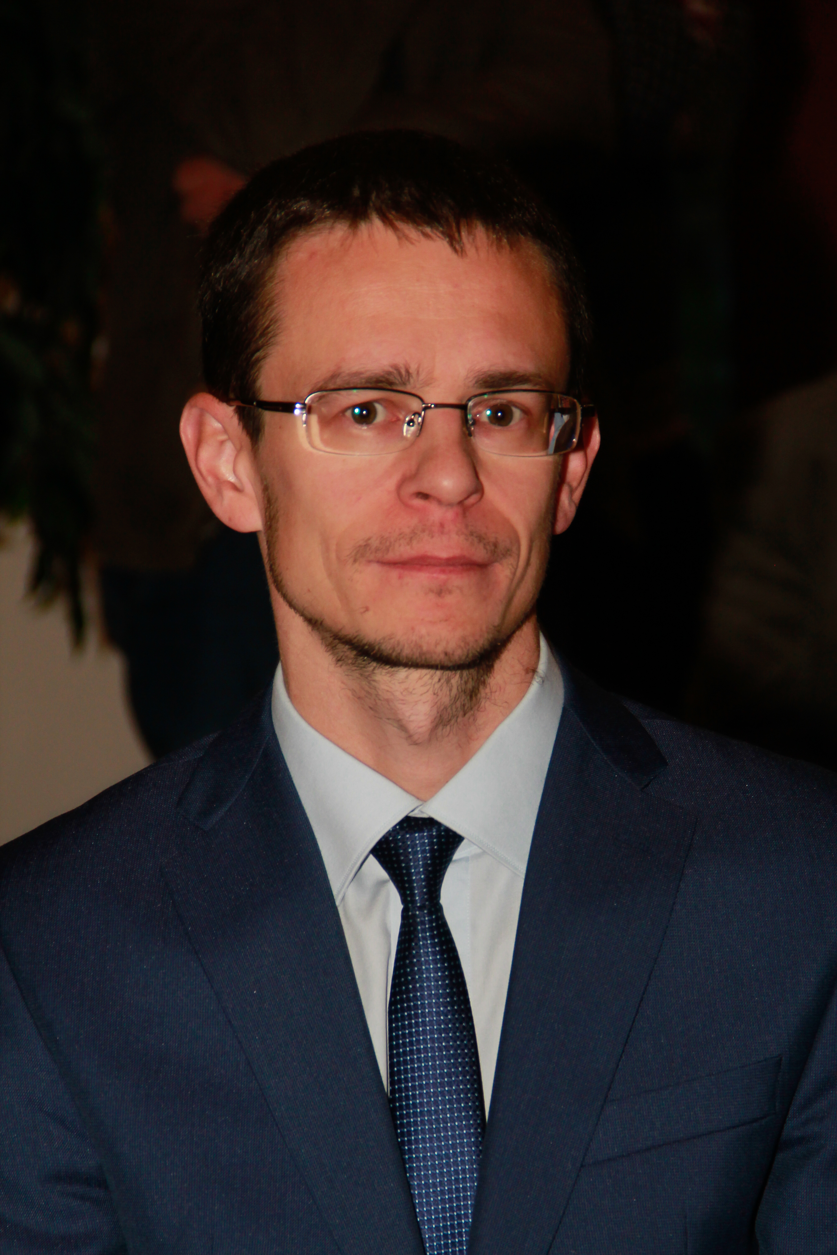 Draughts player Alexander Georgiev during the 2015 World Draughts Championship